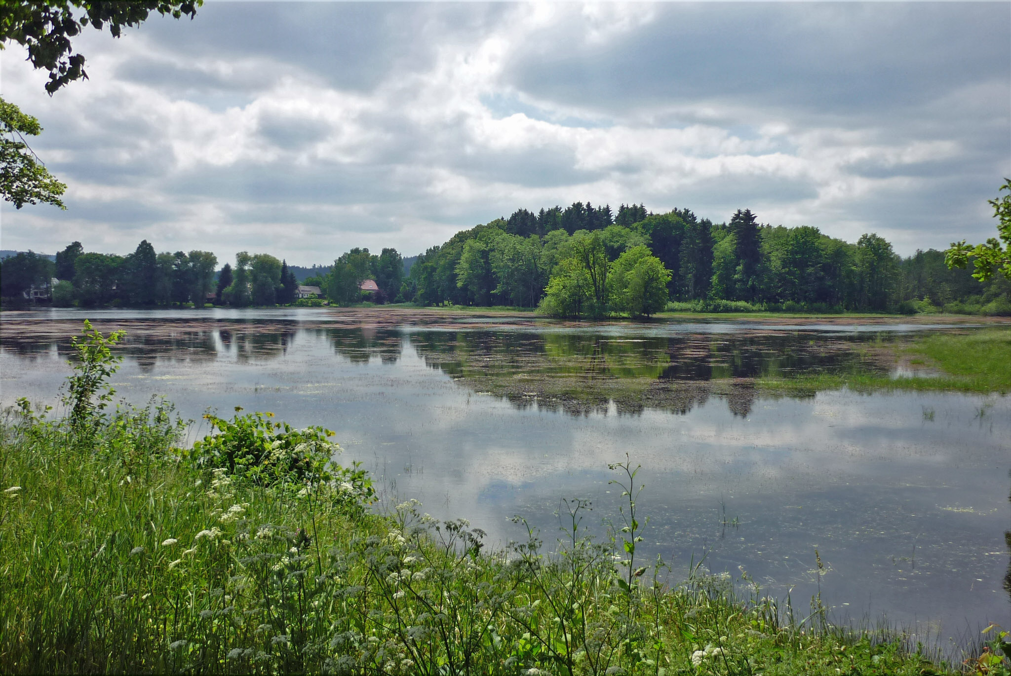 Schlossteich in Hainspach (Lipová) in Nordböhmen